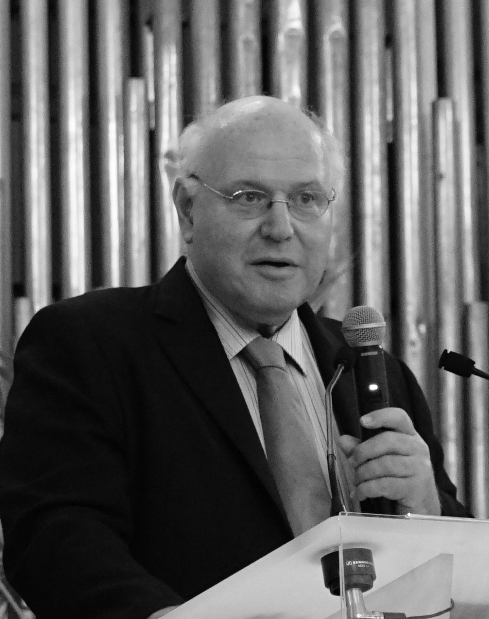 conférence du centenaire, Reims.